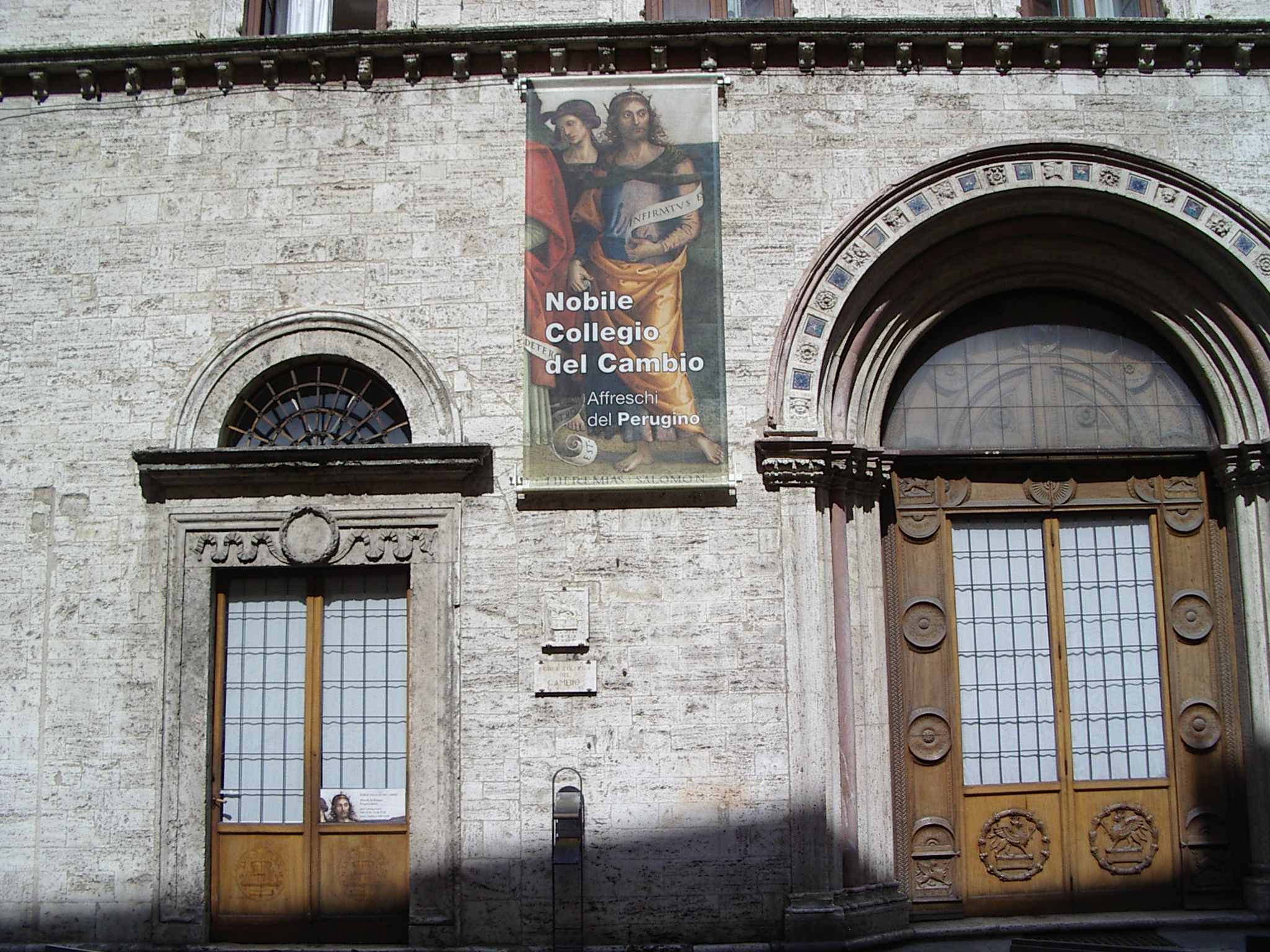 Collegio del Cambio , Pérouse, Italie